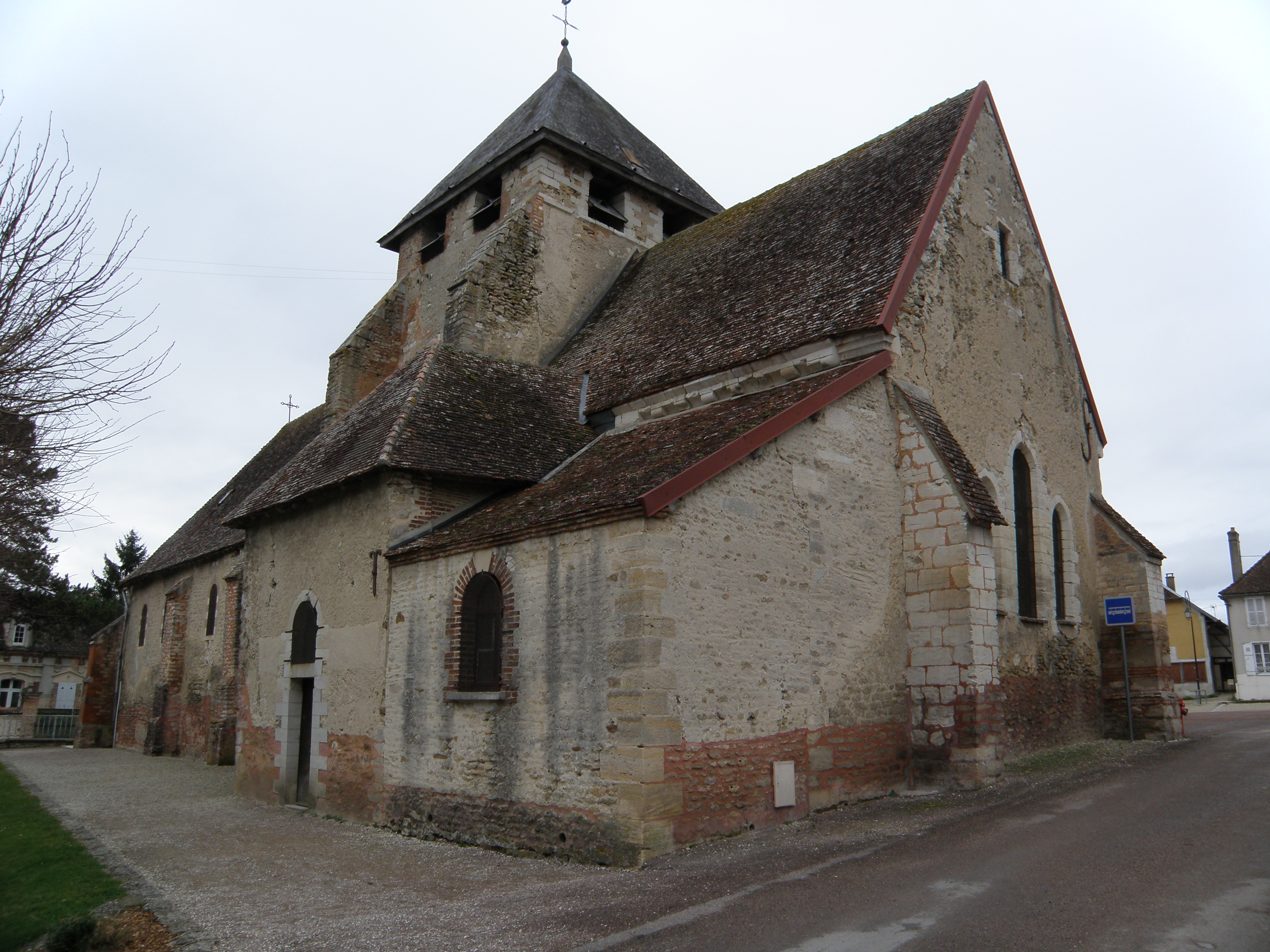 Église Saint-Pierre-aux-Liens, 10390 Clérey